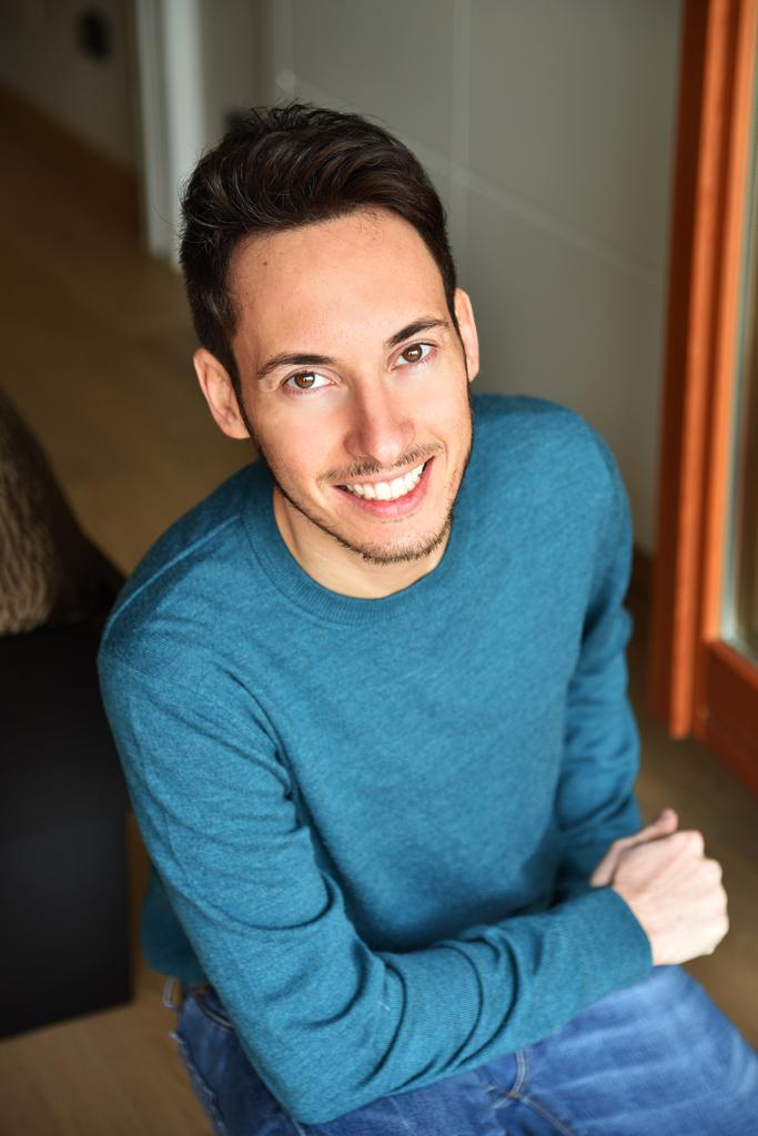 Riccardo Cresci